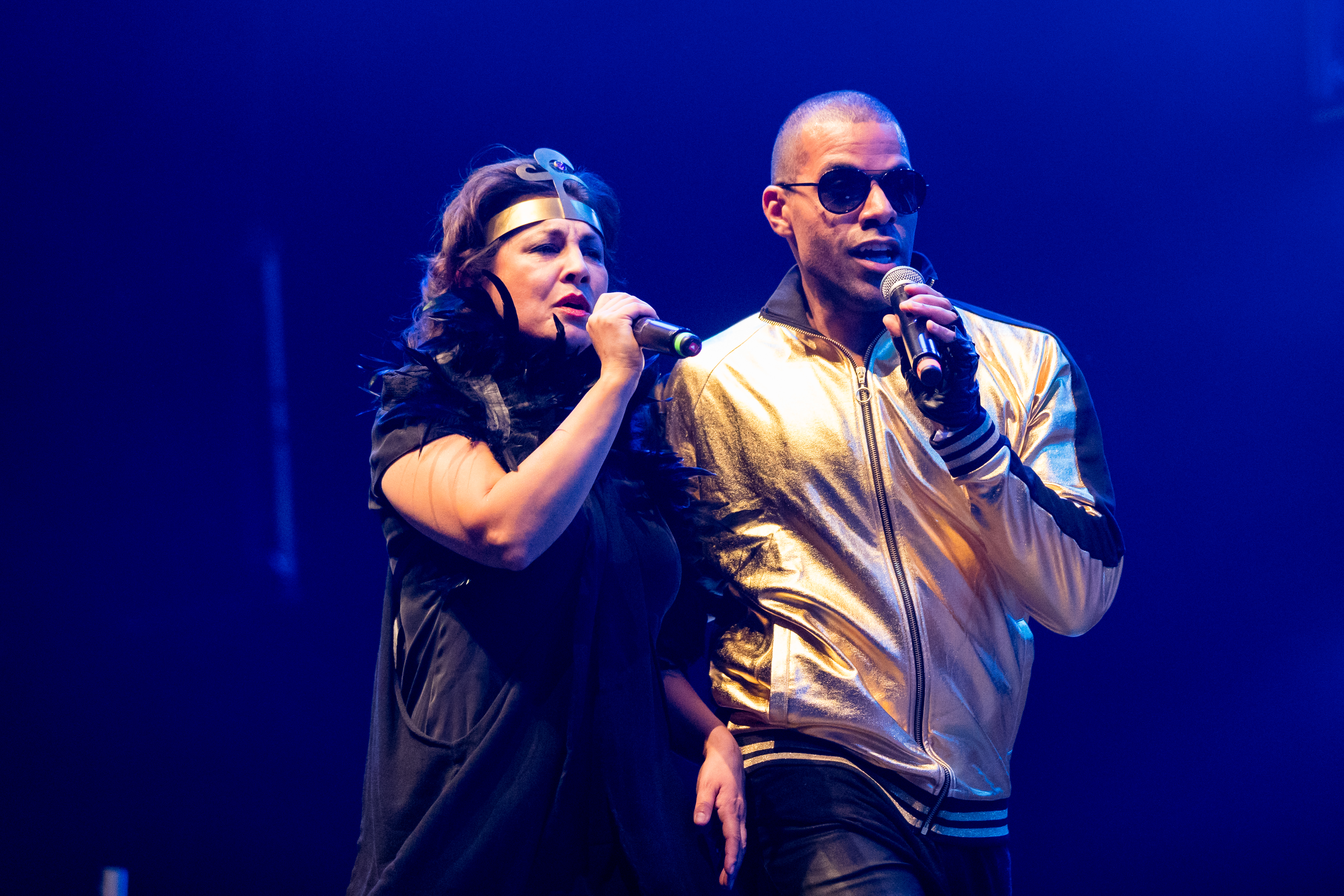 Pharao during Sunshine Live - Die 90er Live on Stage at Maimarkthalle & Maimarktclub, Mannheim, Baden-Württemberg, Germany on 2017-11-25, Photo: Sven Mandel